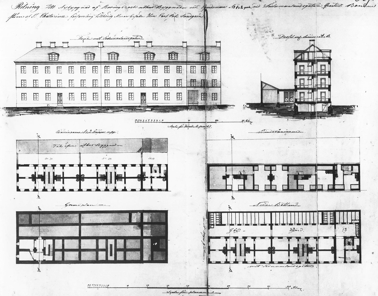 Ritning till bostadshuset Bonden större 45